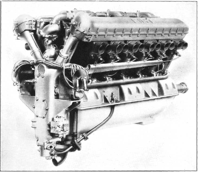 Motor Fiat AS-2 de 882 caballos de fuerza utilizado por Mario Bernardi en su Macchi M.39 para ganar el trofeo Schneider de 1926. Imagen publicada el 25 de noviembre de 1926 en la edición 935 de la publicación "Flight International" del Reino Unido.